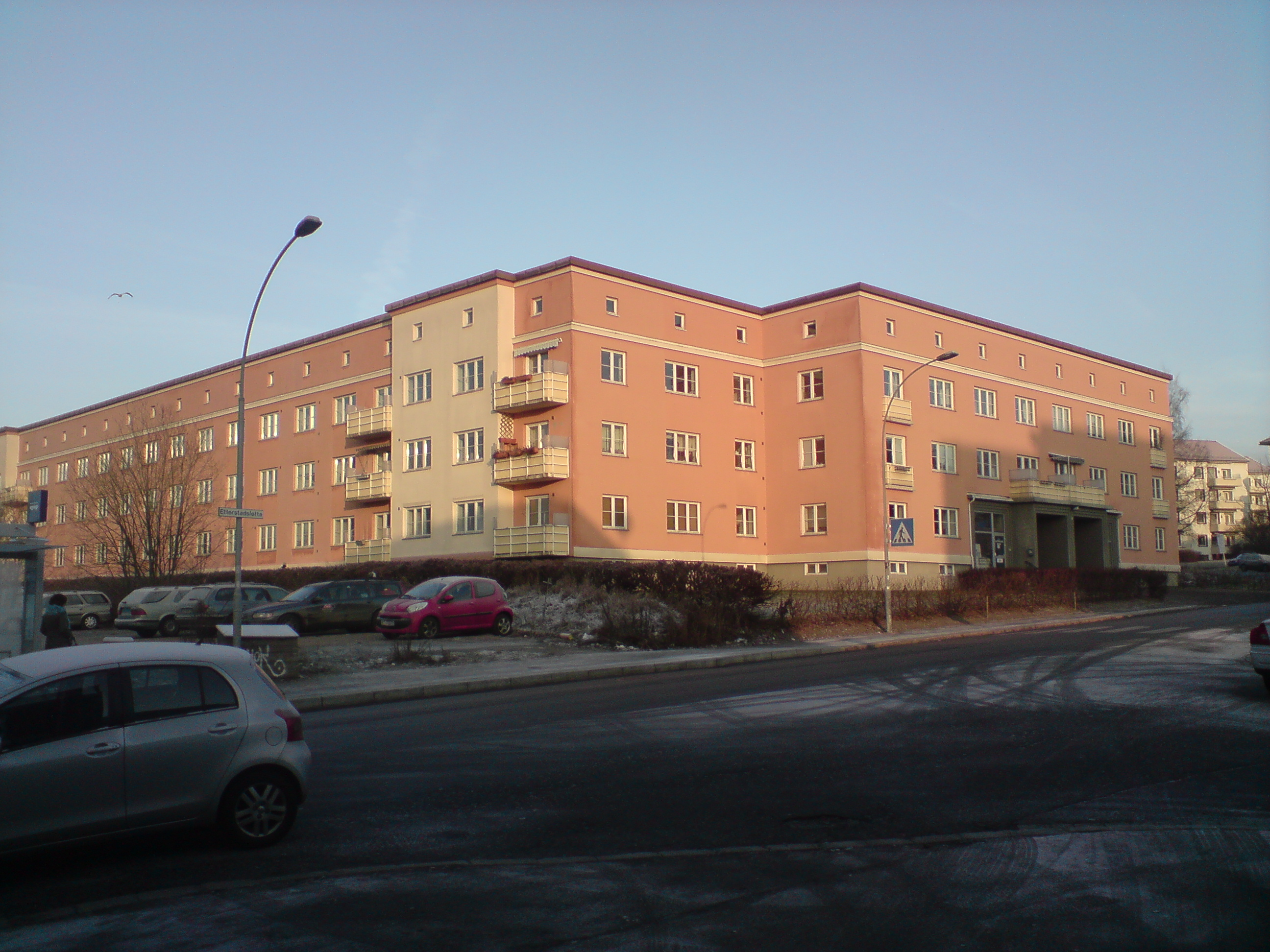 Etterstadslettasletta 4 in Oslo